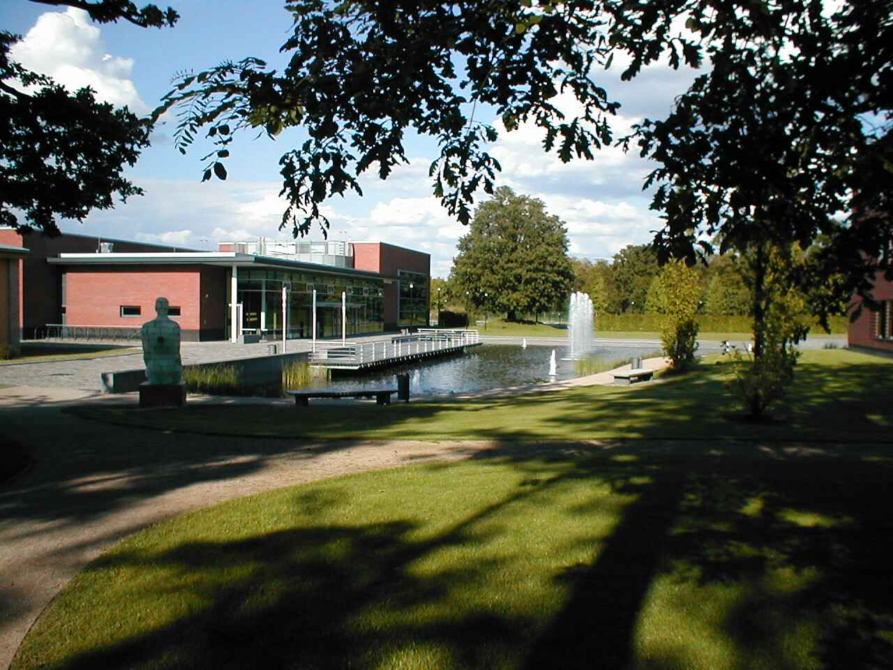 Universität Potsdam, Hoersaalgebaeude des HPI